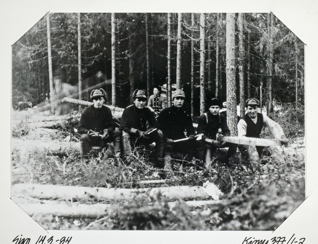 Suojeluskunnan ampumaratatalkoot Jalasjärven kirkonkylässä